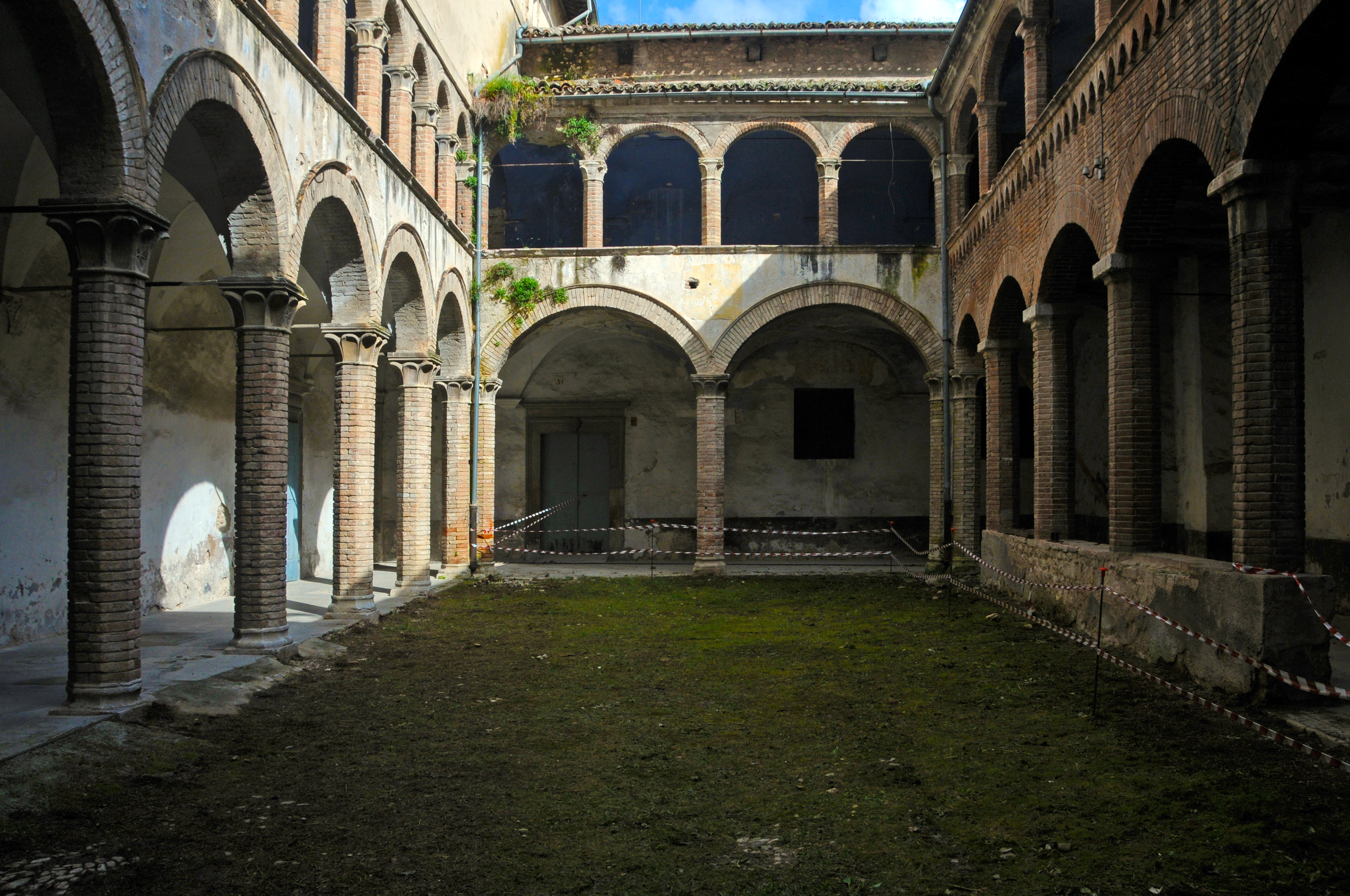 Monastero della Stella portico trecentesco